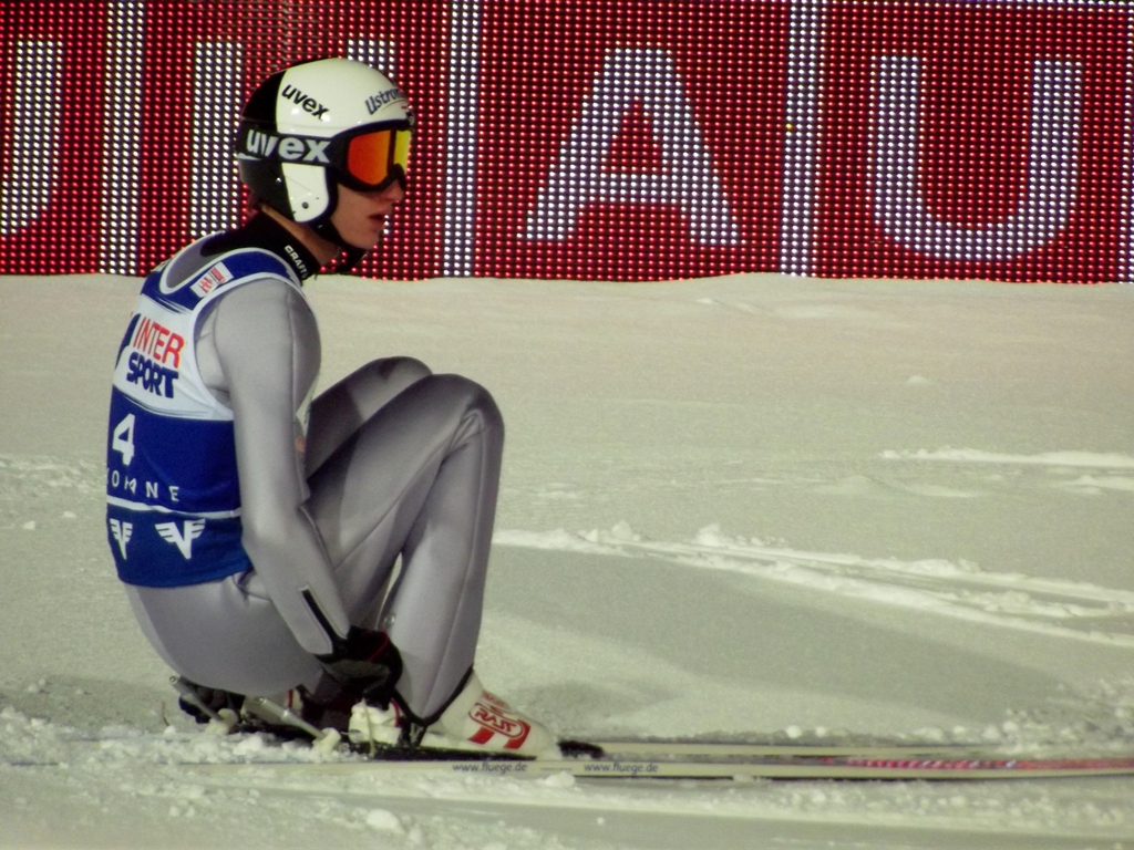 Zdjęcie zrobione podczas zawodów Pucharu Świata w Zakopanem w kokach narciarskich ze stycznia 2012 r.